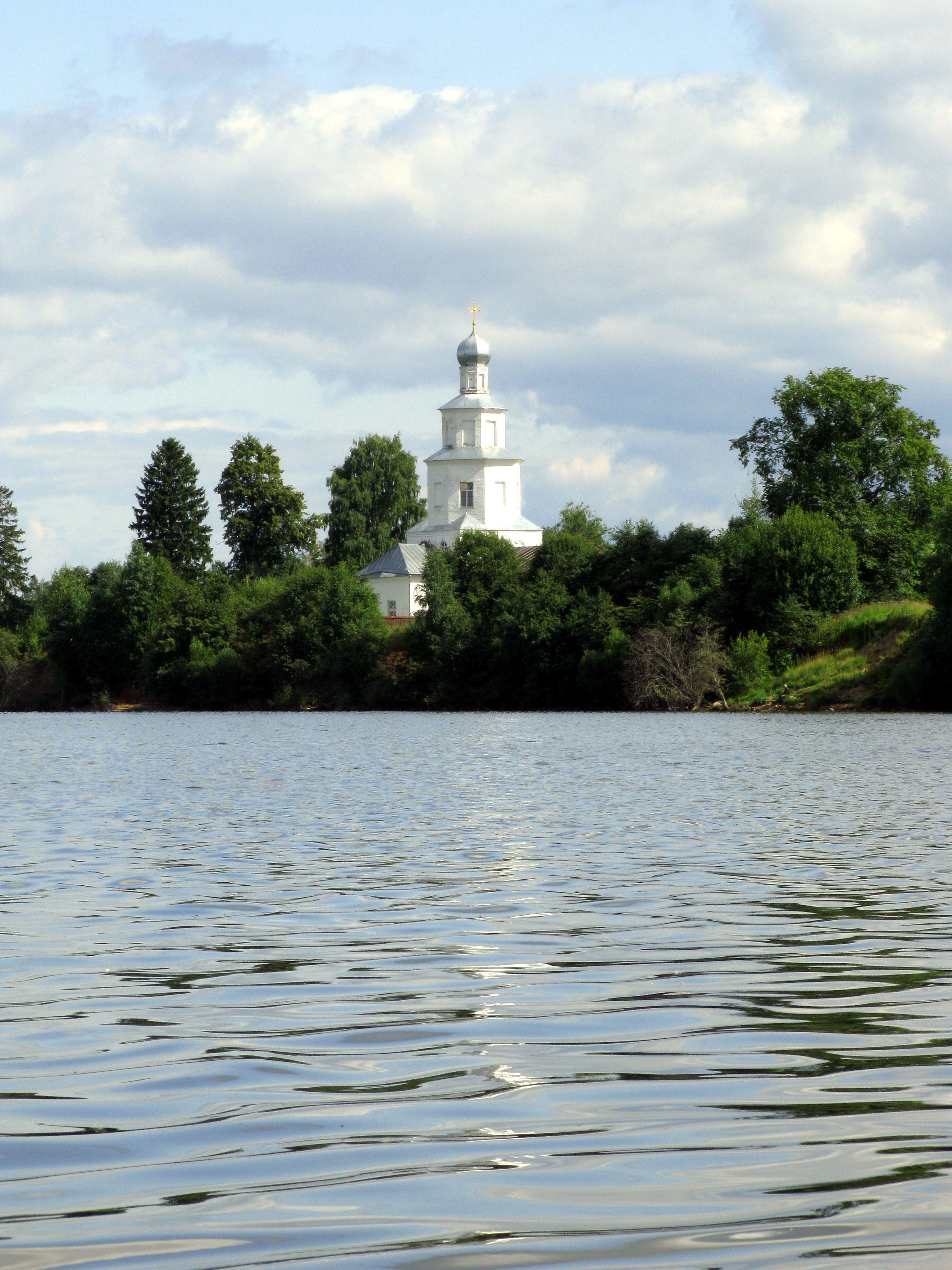 Церковь Благовещения Пресвятой Богородицы в деревне Бражниково (вид с реки Руза) / Church of the Annunciation (Brazhnikovo)